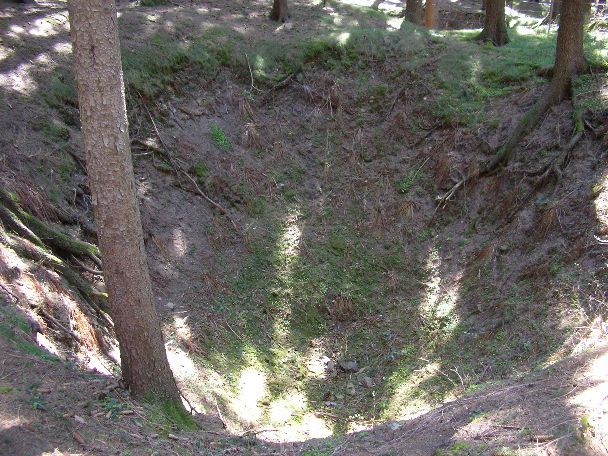 Pinge auf dem Hauptgangzug Landkreis Schneeberg, Erzgebirge, Sachsen, Deutschland